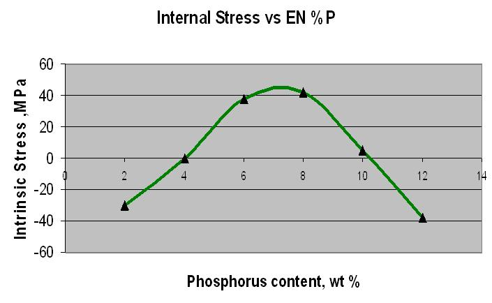 schéma electroless nickel